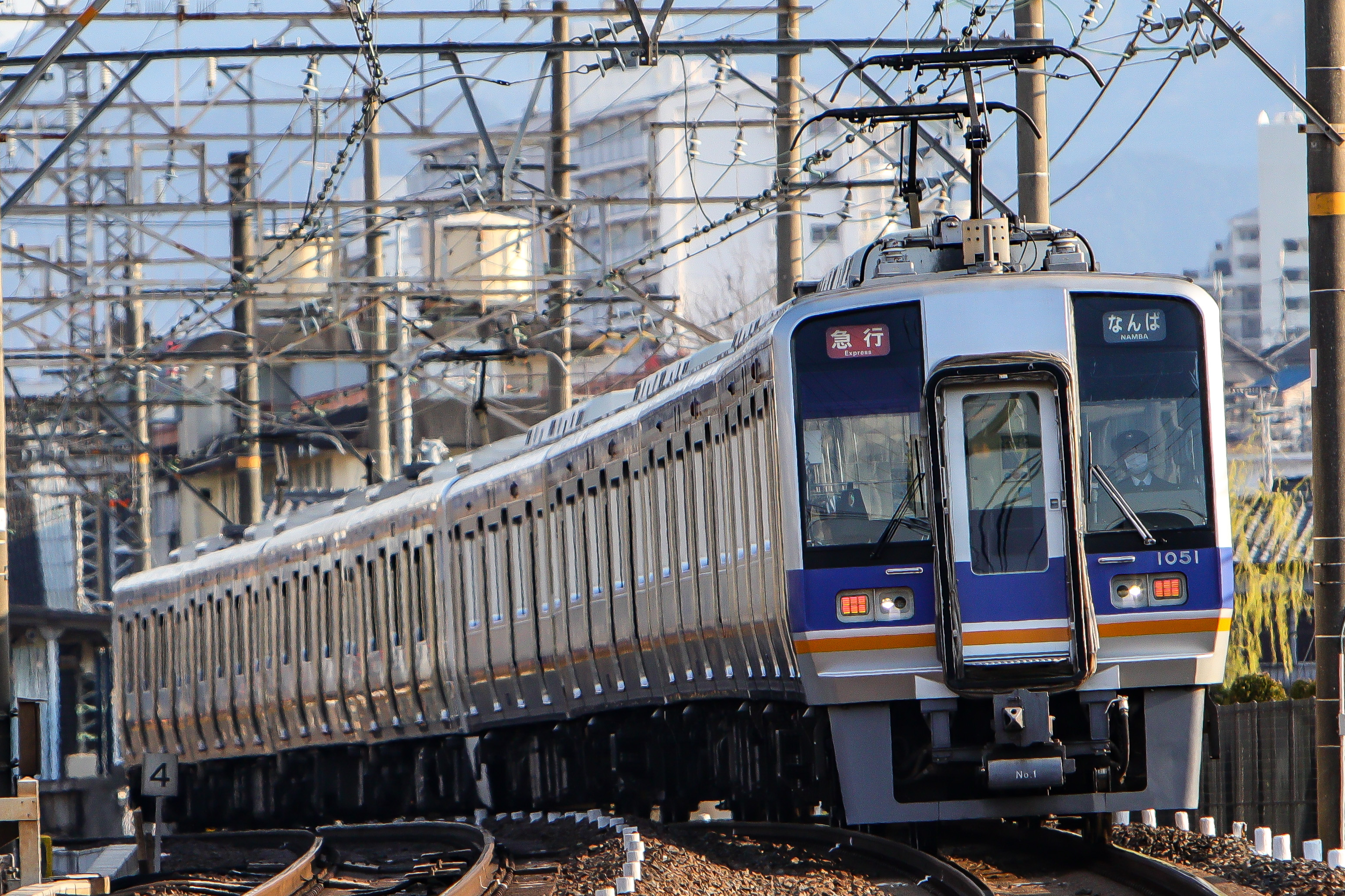 南海8300系 高野線8両編成（8300系併結）